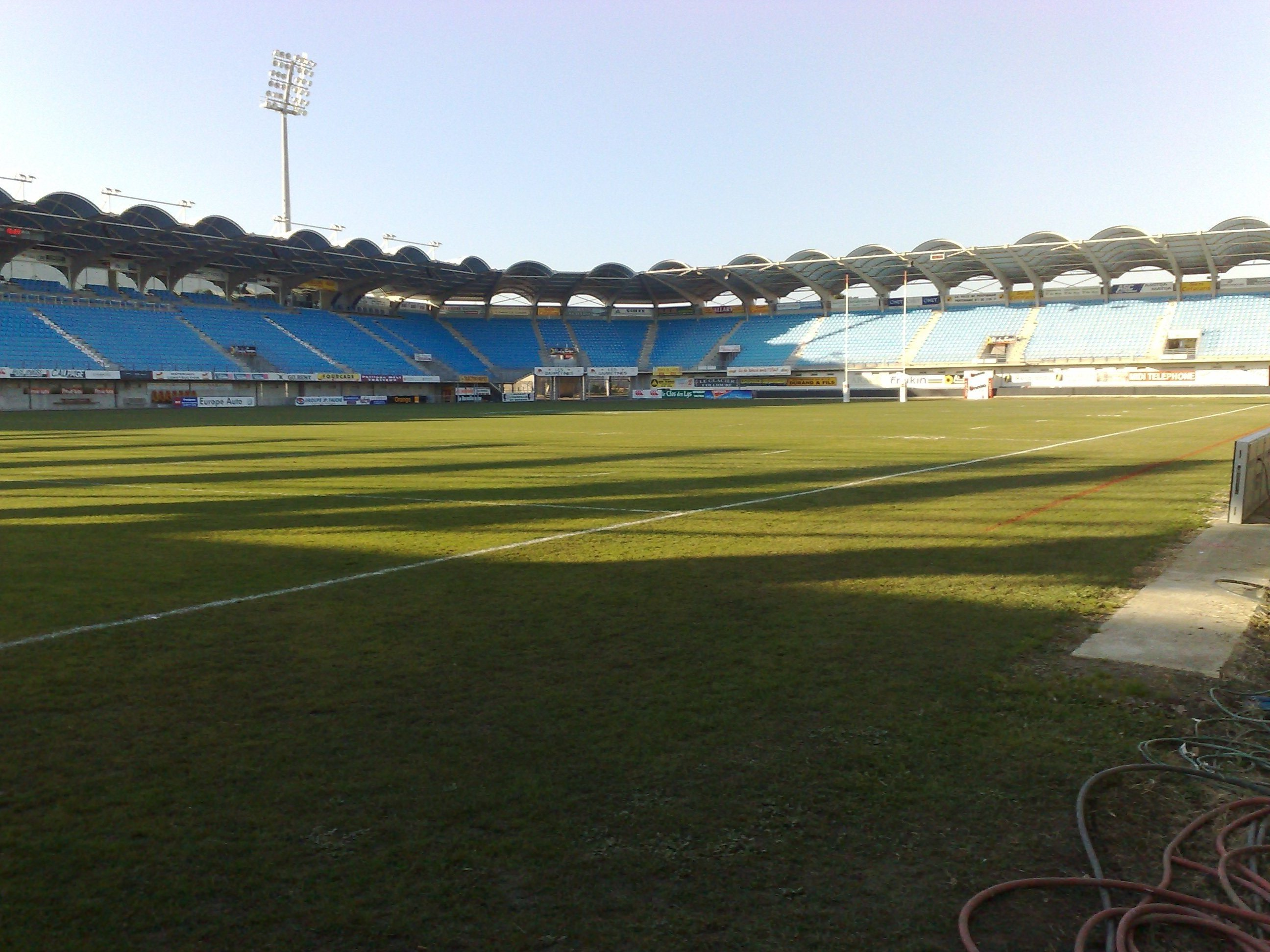 Stade de rugby de l'USAP, club de rugby a 15 de Perpignan.